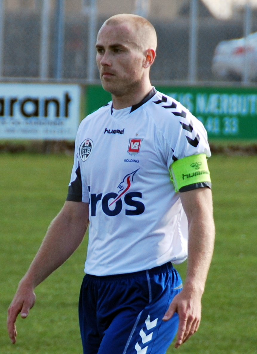 Fodboldspilleren Jens Berthel Askou fra Vejle Boldklub Kolding. Her i en testkamp mod Viborg FF på VFFs træningsanlæg på Kirkebækvej i Viborg.